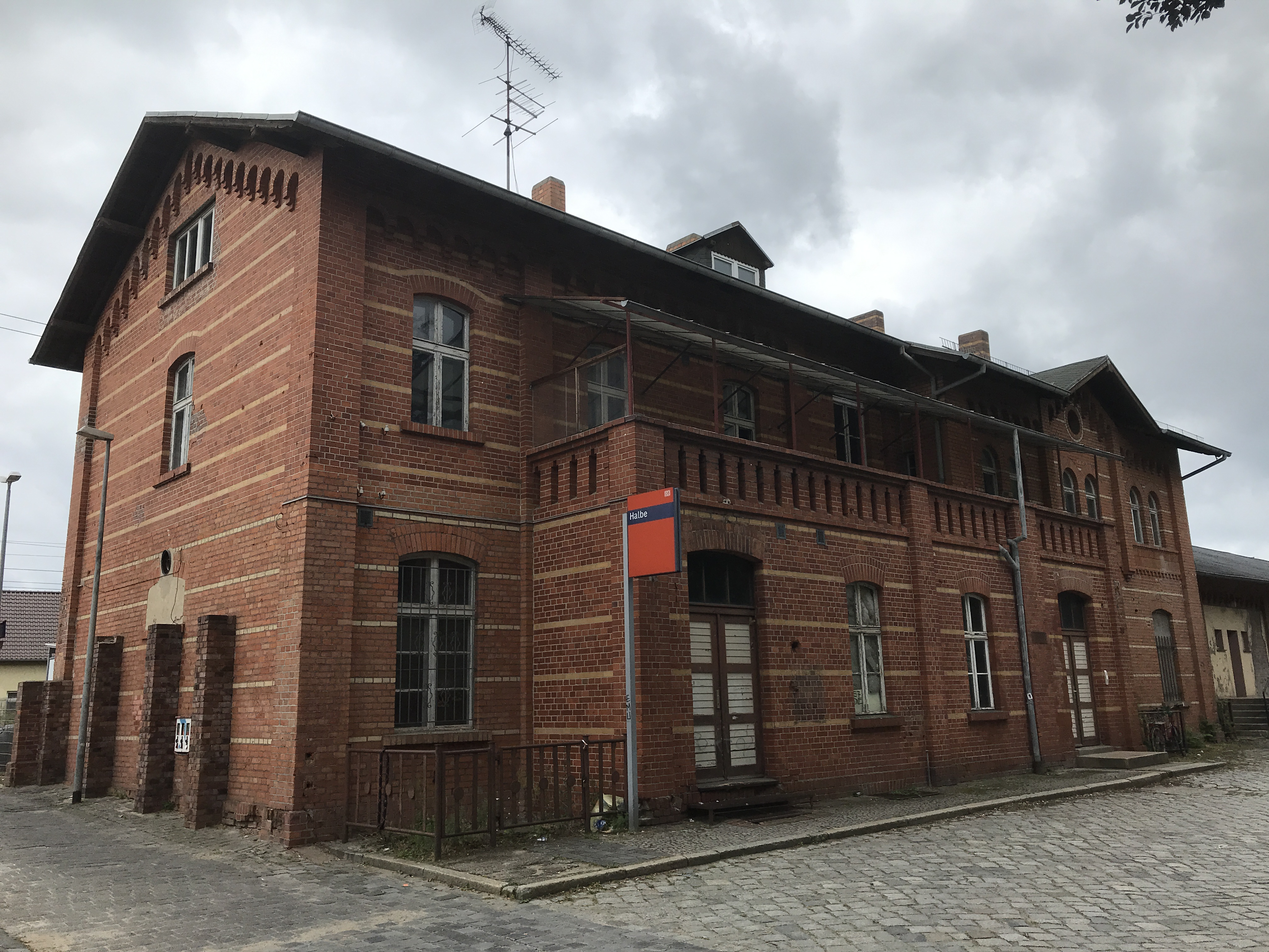 Denkmalgeschützter Bahnhof von Halbe, Brandenburg